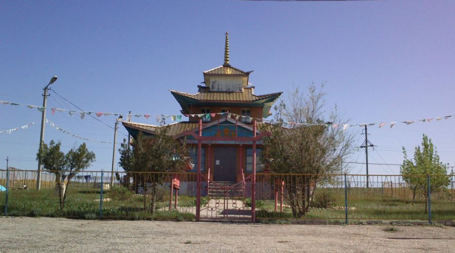 Калмыкия, Целинный район, пос. Ики-Чонос